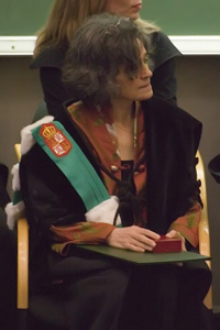 Bahiyyih Nakhjavani